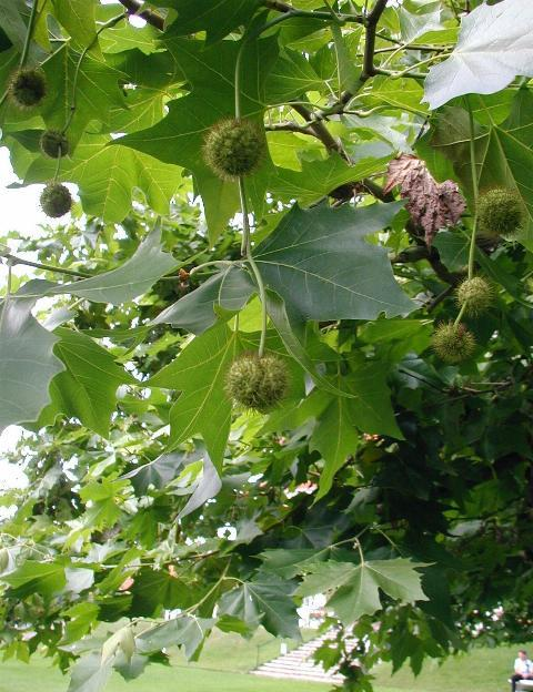 Platanus hispanica